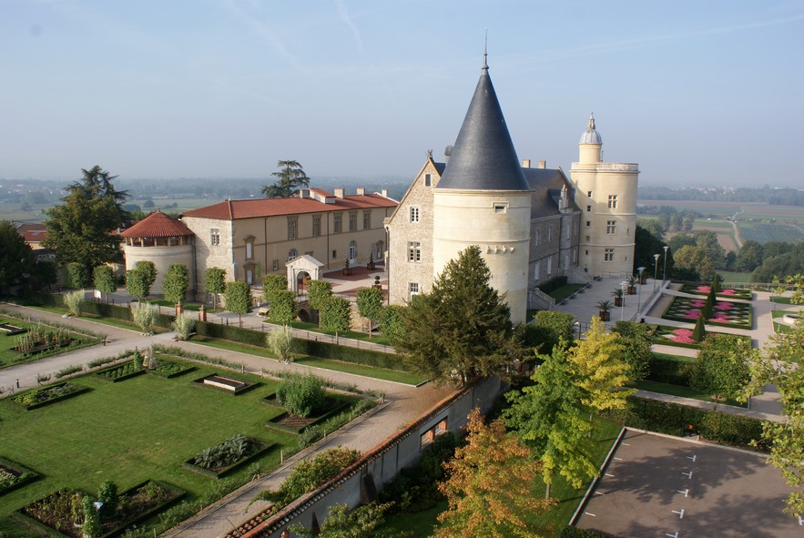 Ænglisc: view of Château de Bouthéon